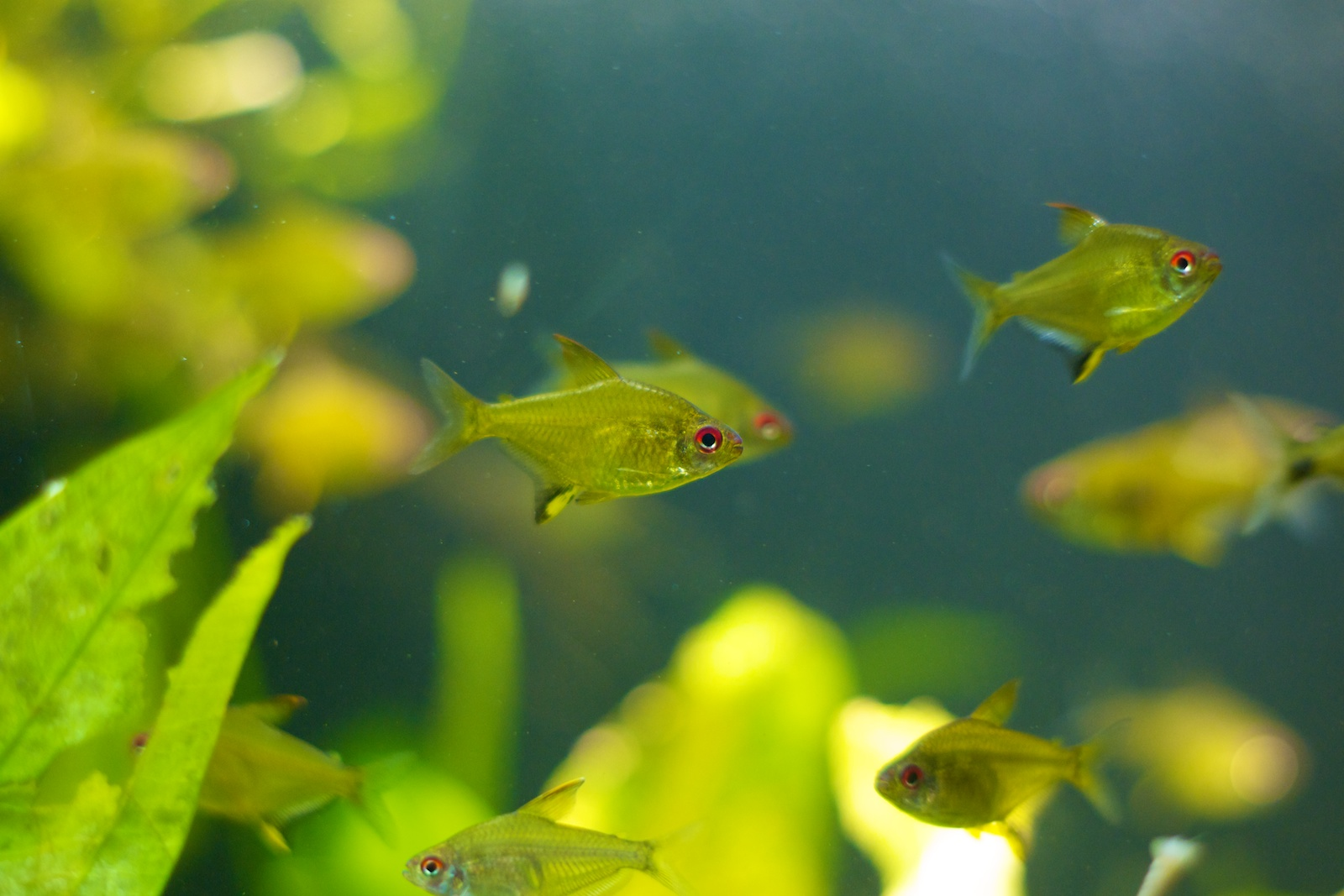 London Zoo